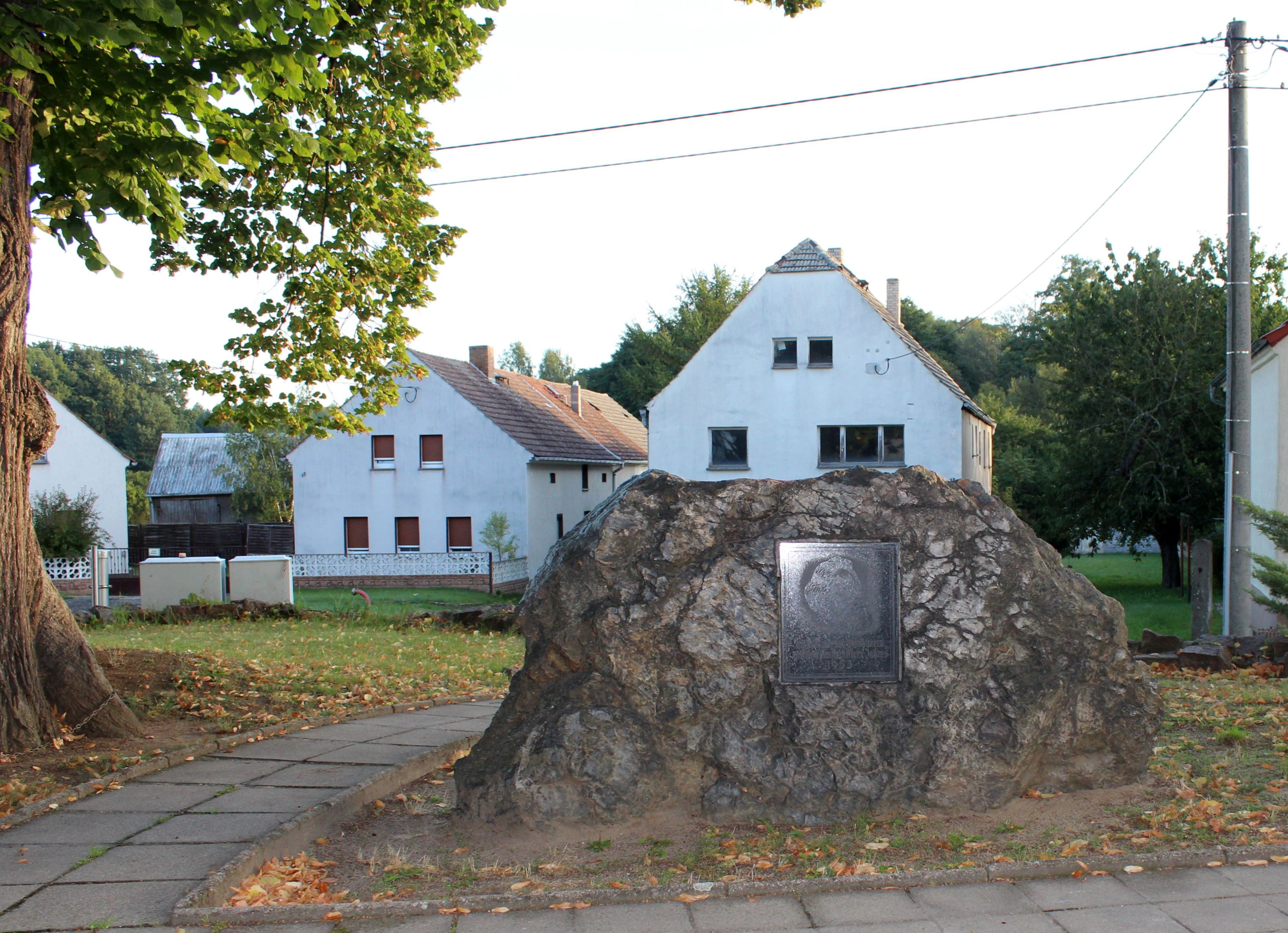 Das Karl-Marx-Denkmal in Kraupa.